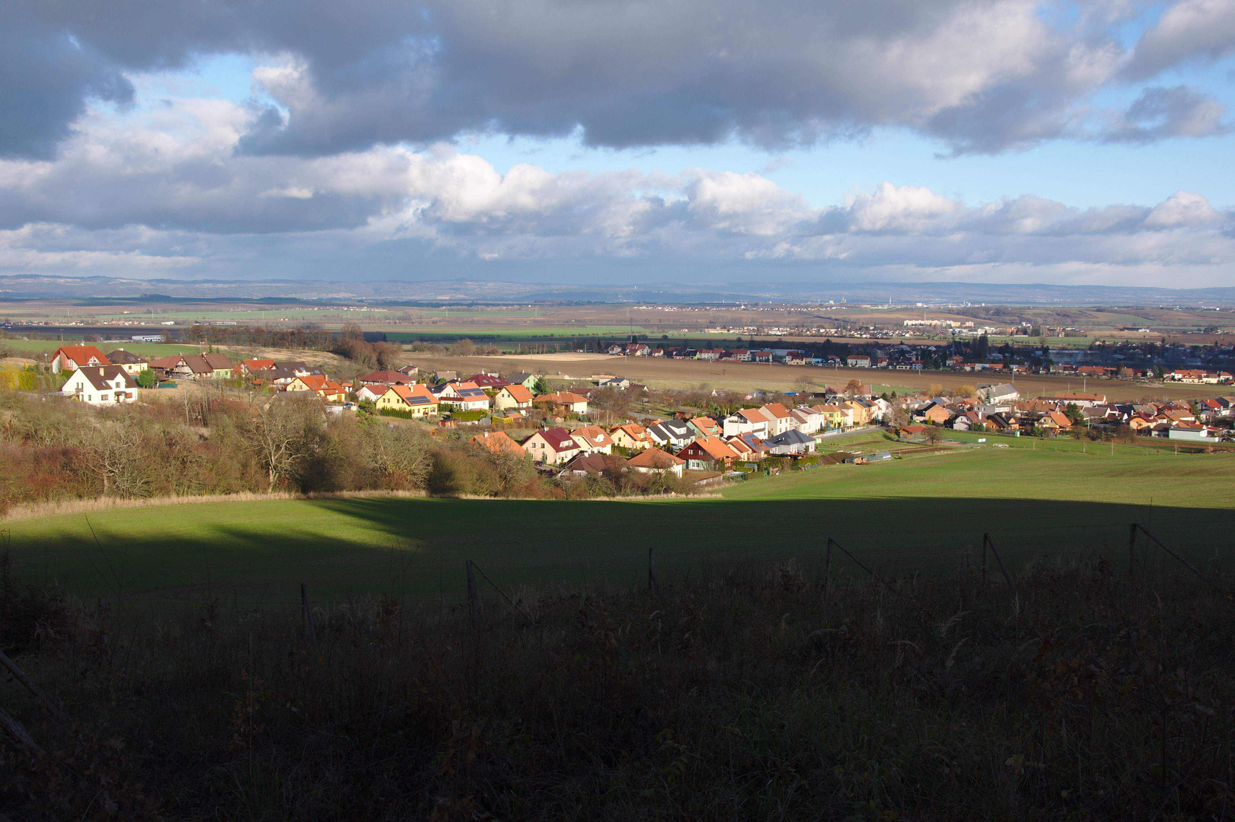 Pohled na obec od jihozápadu, Slatinky, okres Prostějov